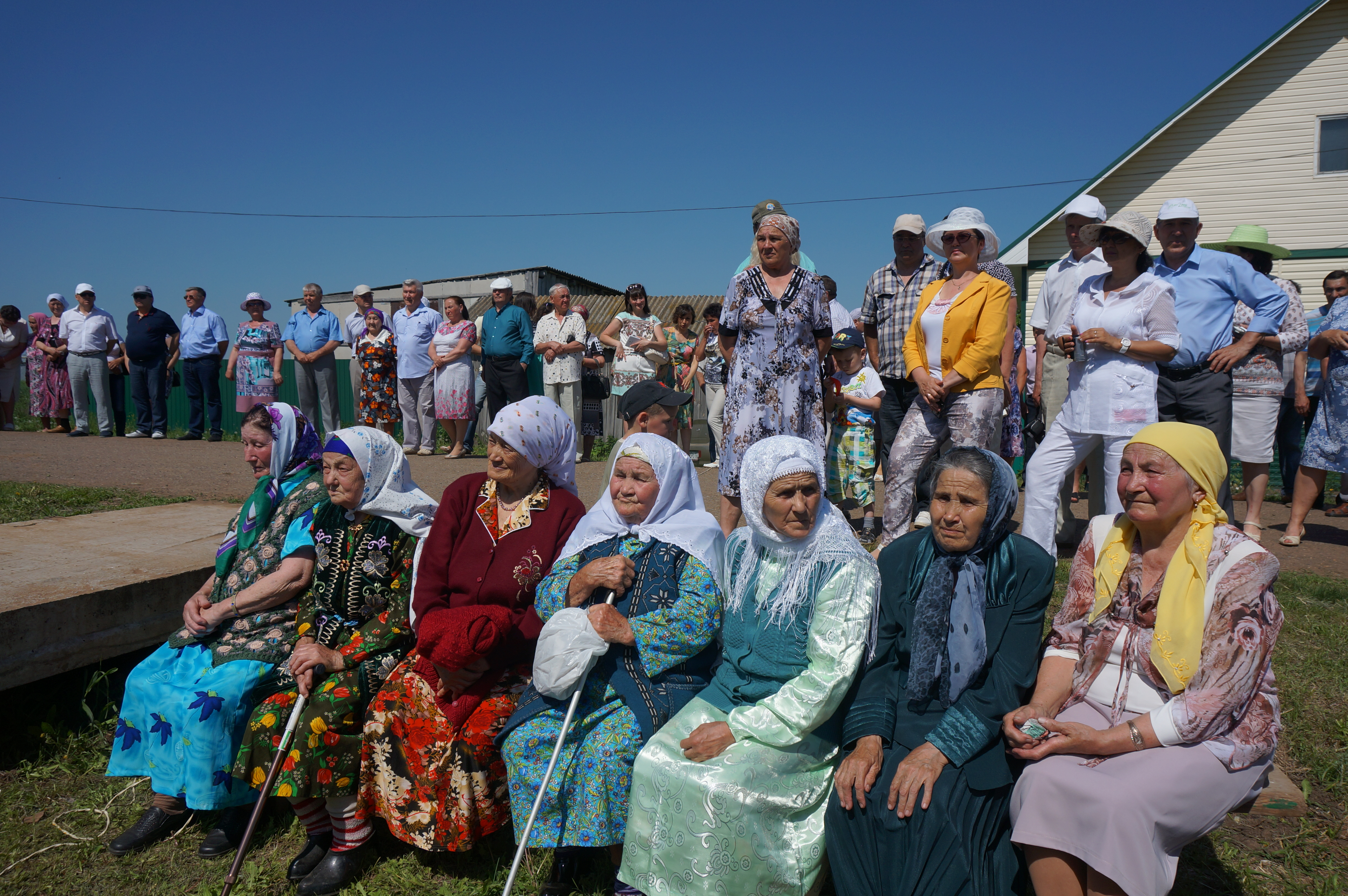 Башҡортса: Борай районы Абдулла ауылы тыл һалдаттары, 2015 йыл. Ансар Нуртдинов архивынан.